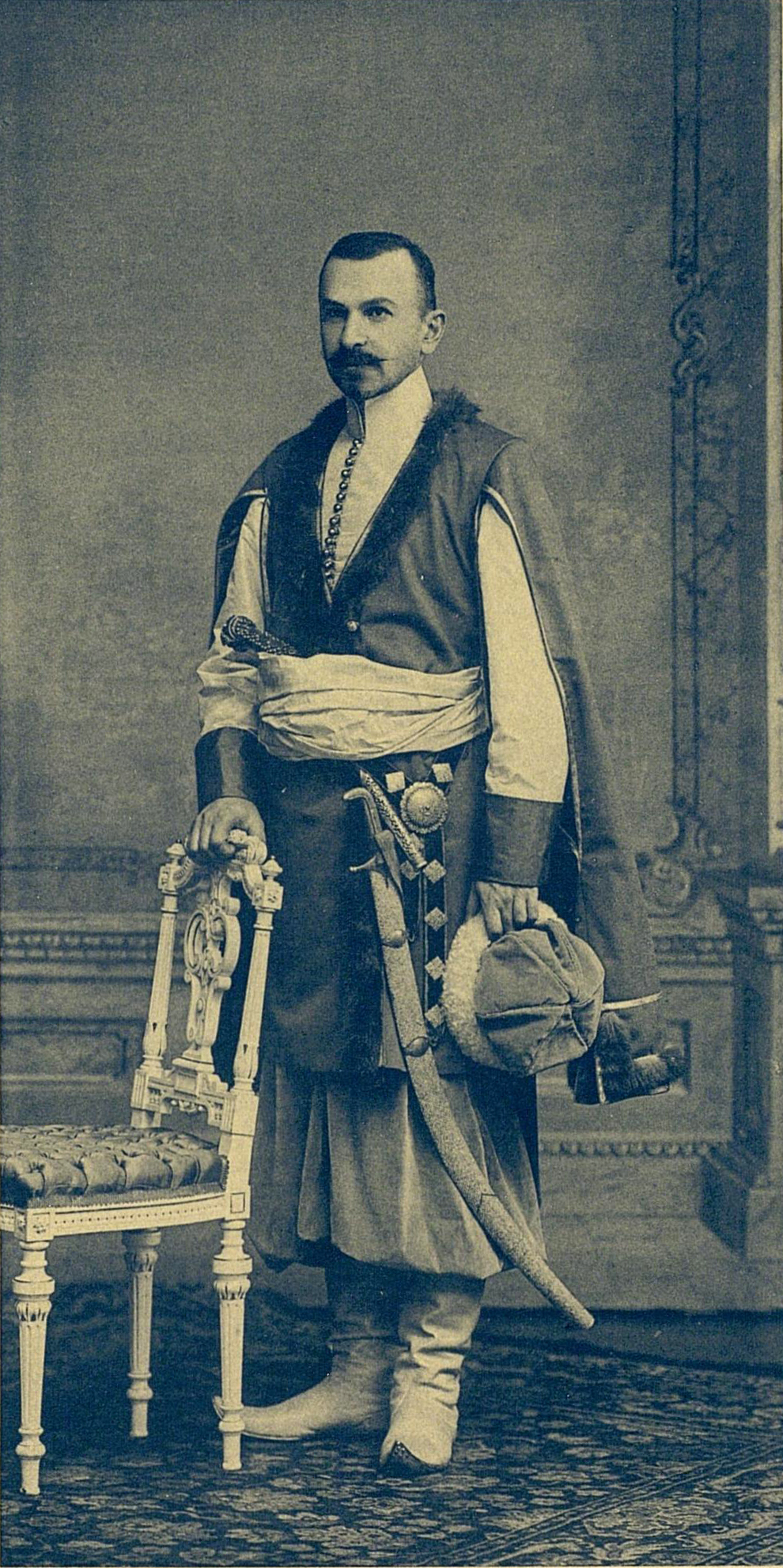 Ротмистр лейб-гвардии Конно-гренадерского полка Иосиф Лукич Исарлов (Есаул Сумского слободского казачьего полка 1651 г.)